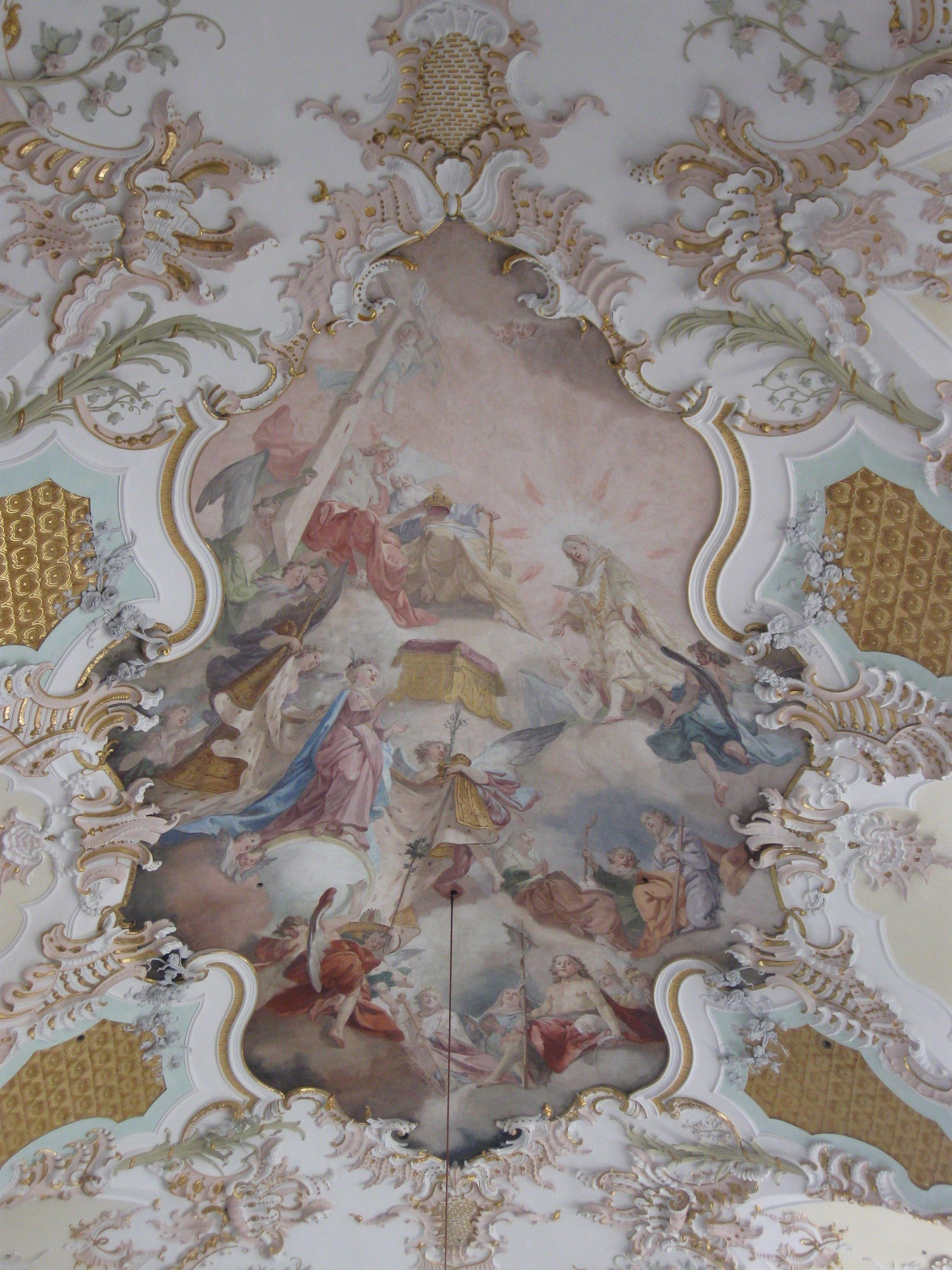 Deckengemälde im Chorraum, Kath. Stadtpfarrkirche Mariä Himmelfahrt, Schongau